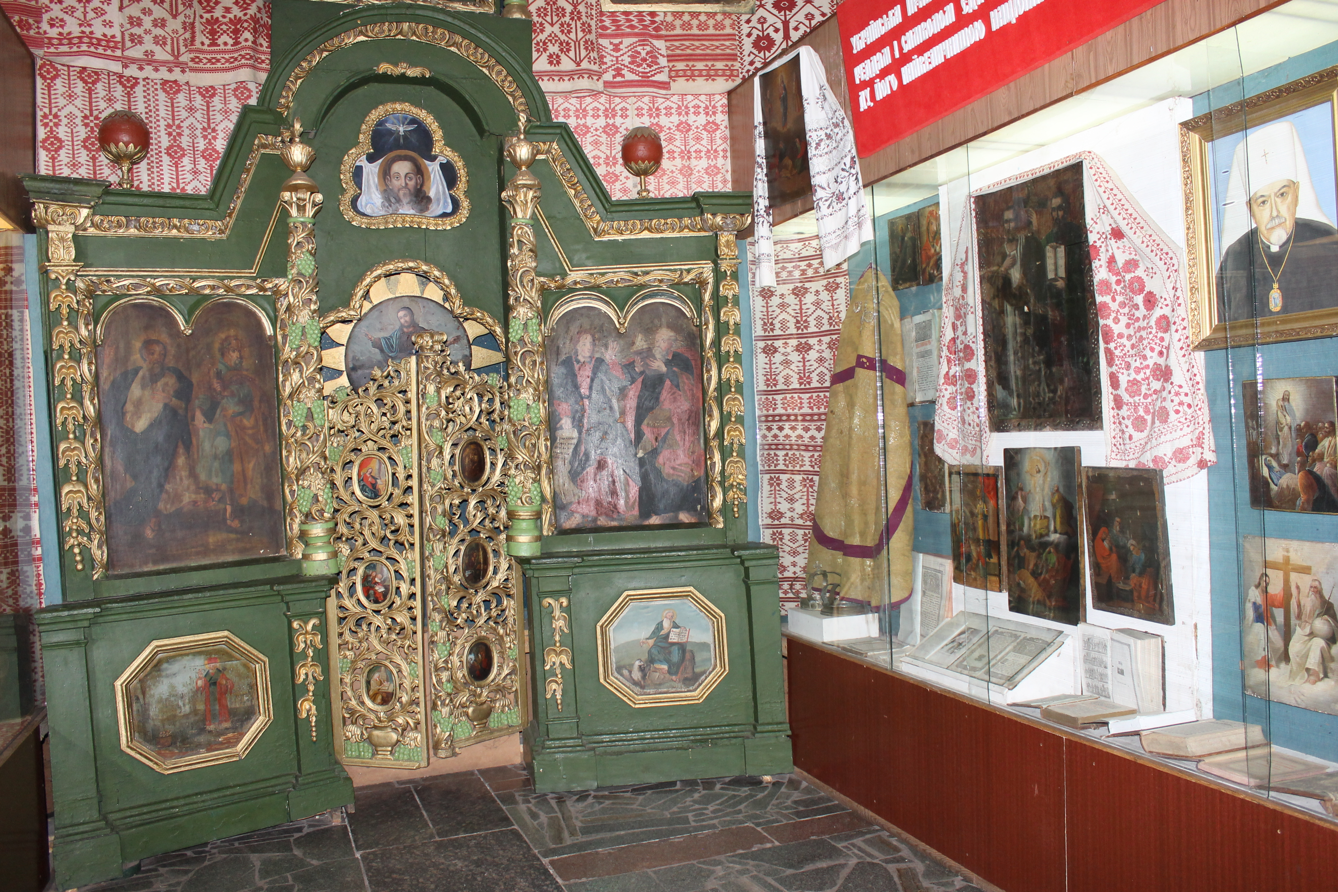 Фото 2. Фрагмент експозиції Музею історії Української православної церкви., Покровська церква з села Сухий Яр